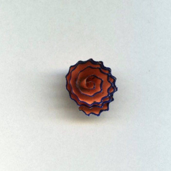 Tzv. ořezky, ktedy to, co normálně leze z ořezávátka